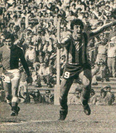 Gol de Kempes a NOB en 1975